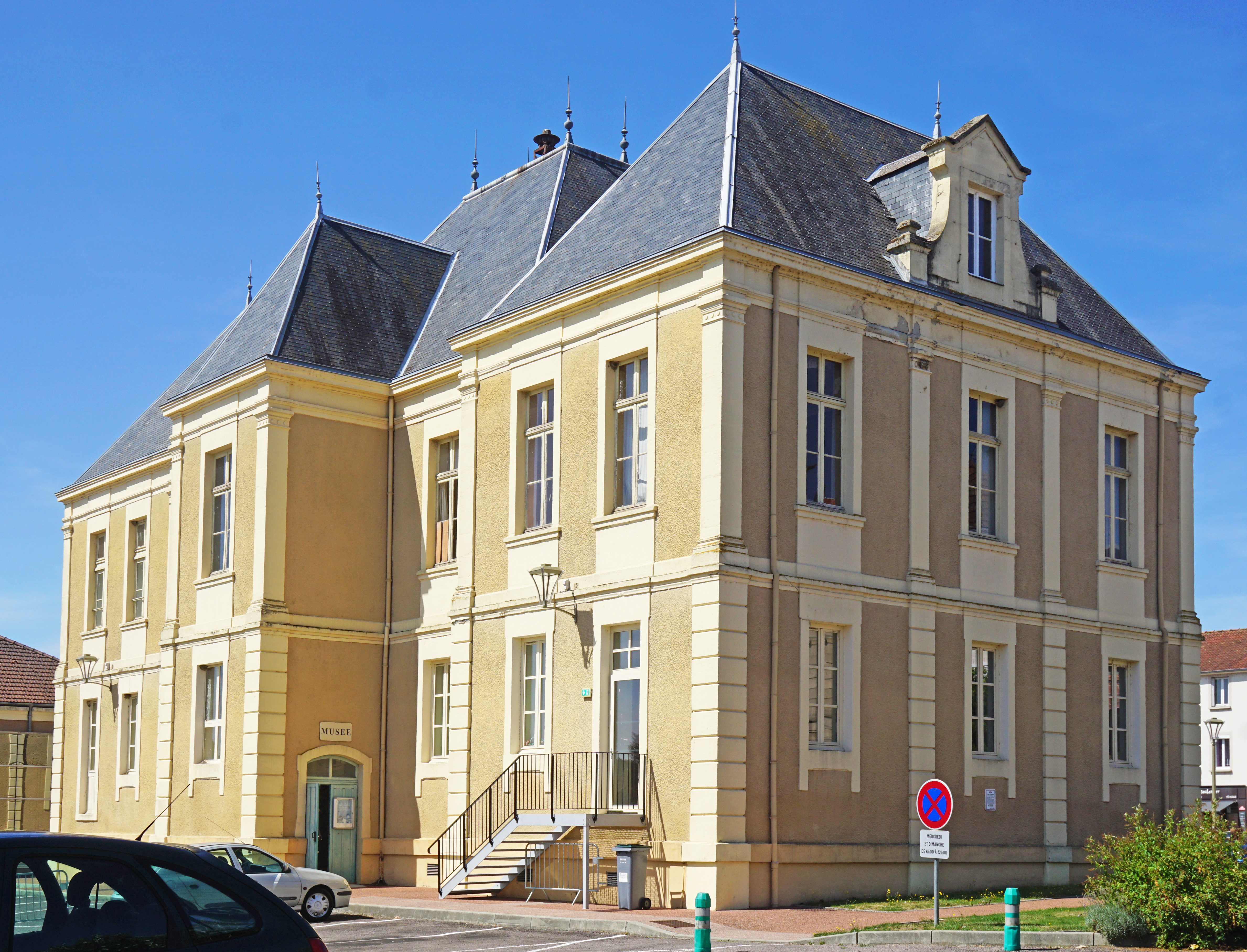 Hôtel de Ville d'Épinac qui accueil notamment les services de la mairie et le musée de la mine.